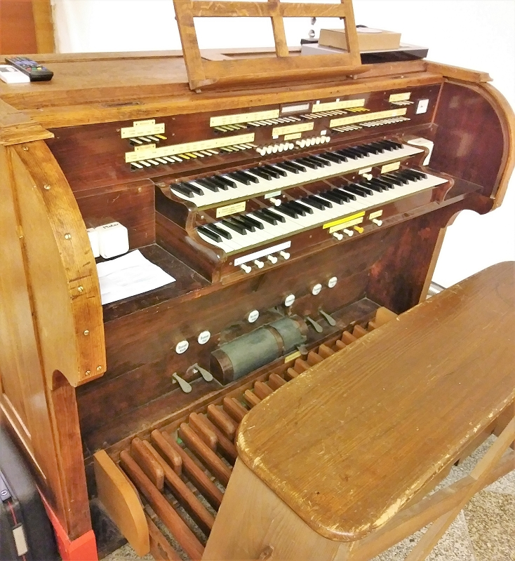 Orgelzentrum Valley